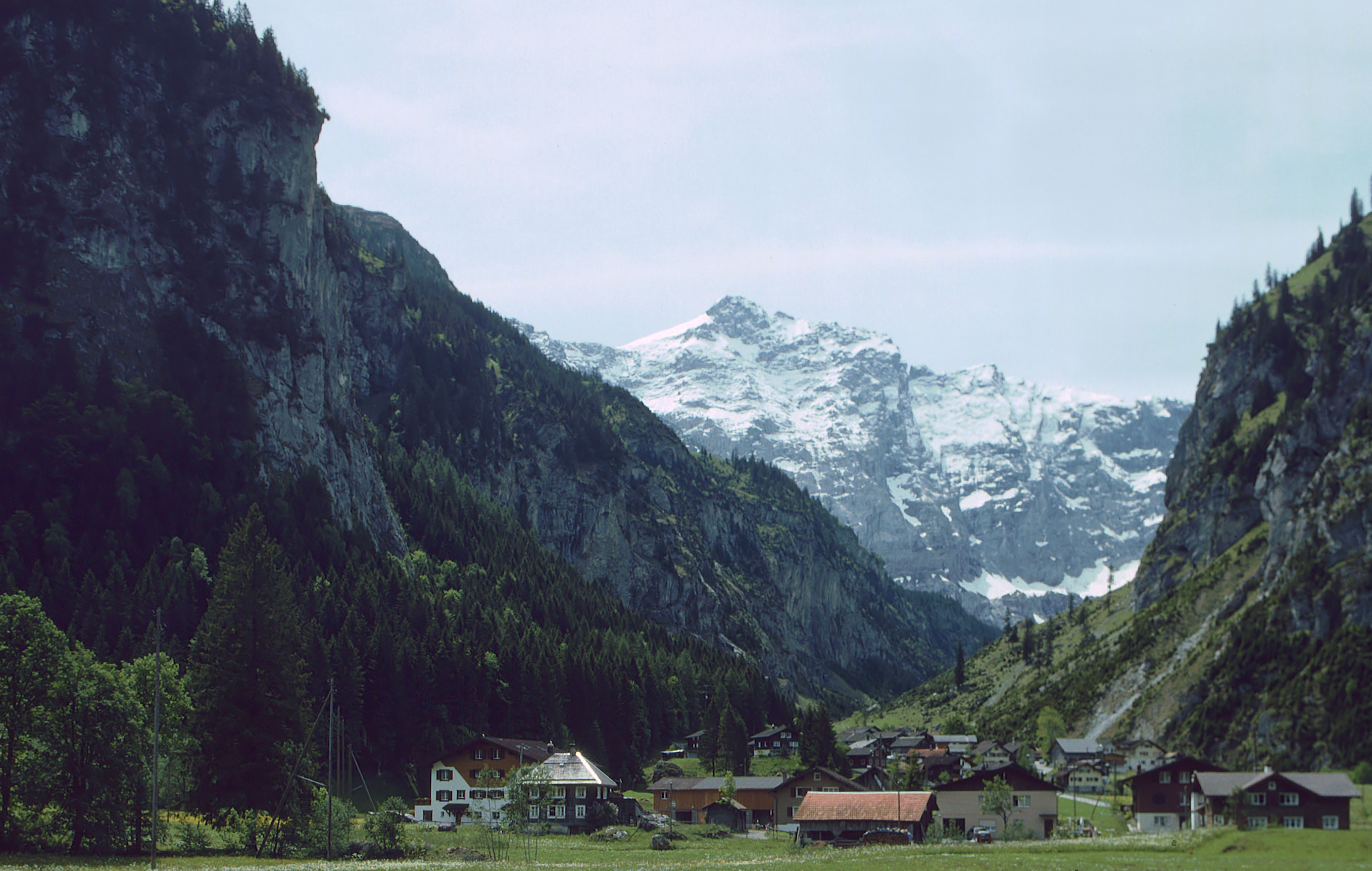 Kanton Uri/Zentralschweiz - Ortsteil von Unterschächen im Schächental vor dem Einschnitt des Brunnitals mit dem 3138m hohen Gross Ruchen darüber.